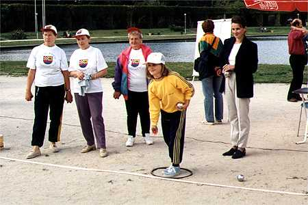 I Mistrzostwa Wrocławia w Petanque - 08.1999 Rzuca Joanna Samuel z Wrocławia.